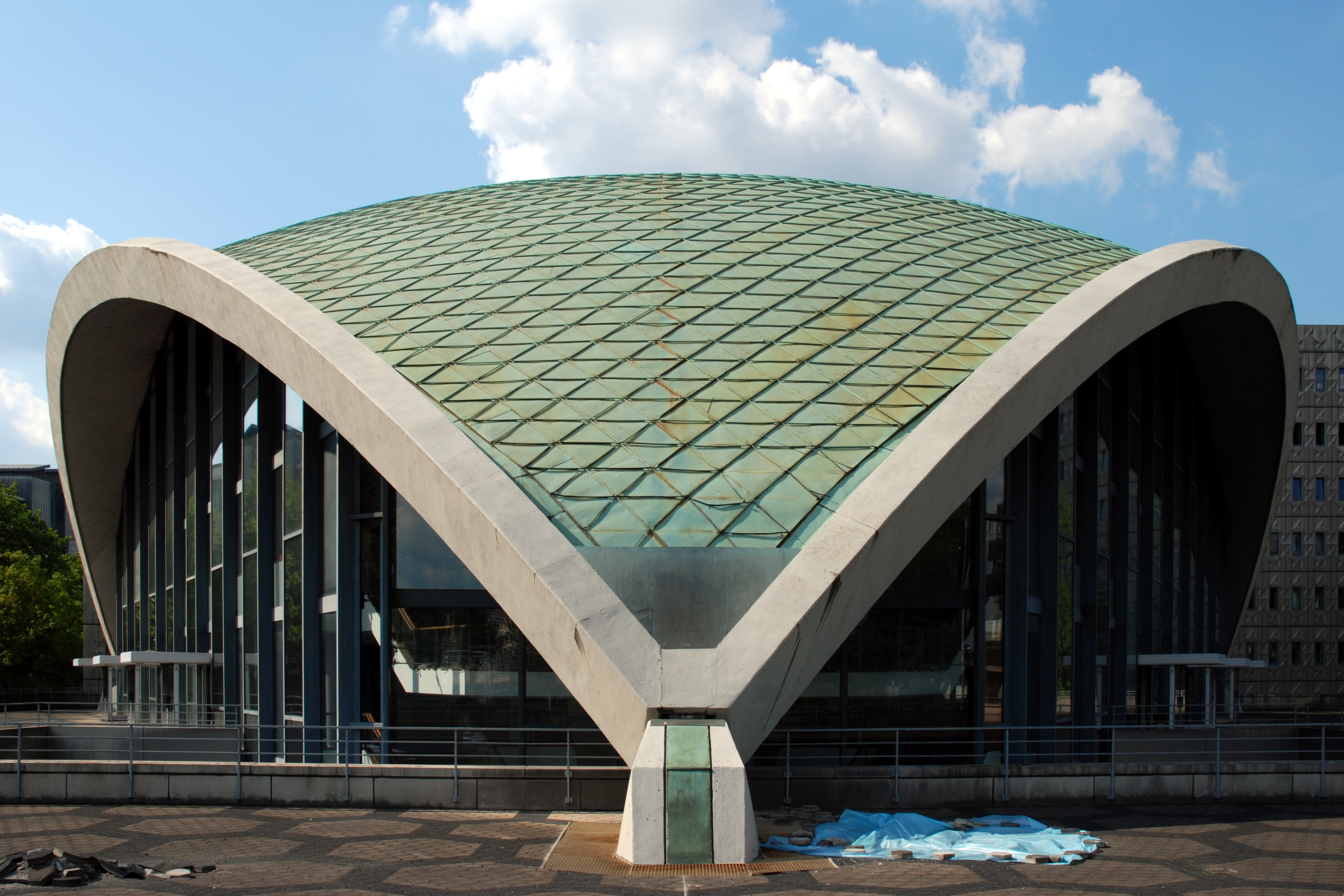 Dortmund, Städtische Bühnen, Stadttheater, Oper, Betonkuppel über Zuschauerraum